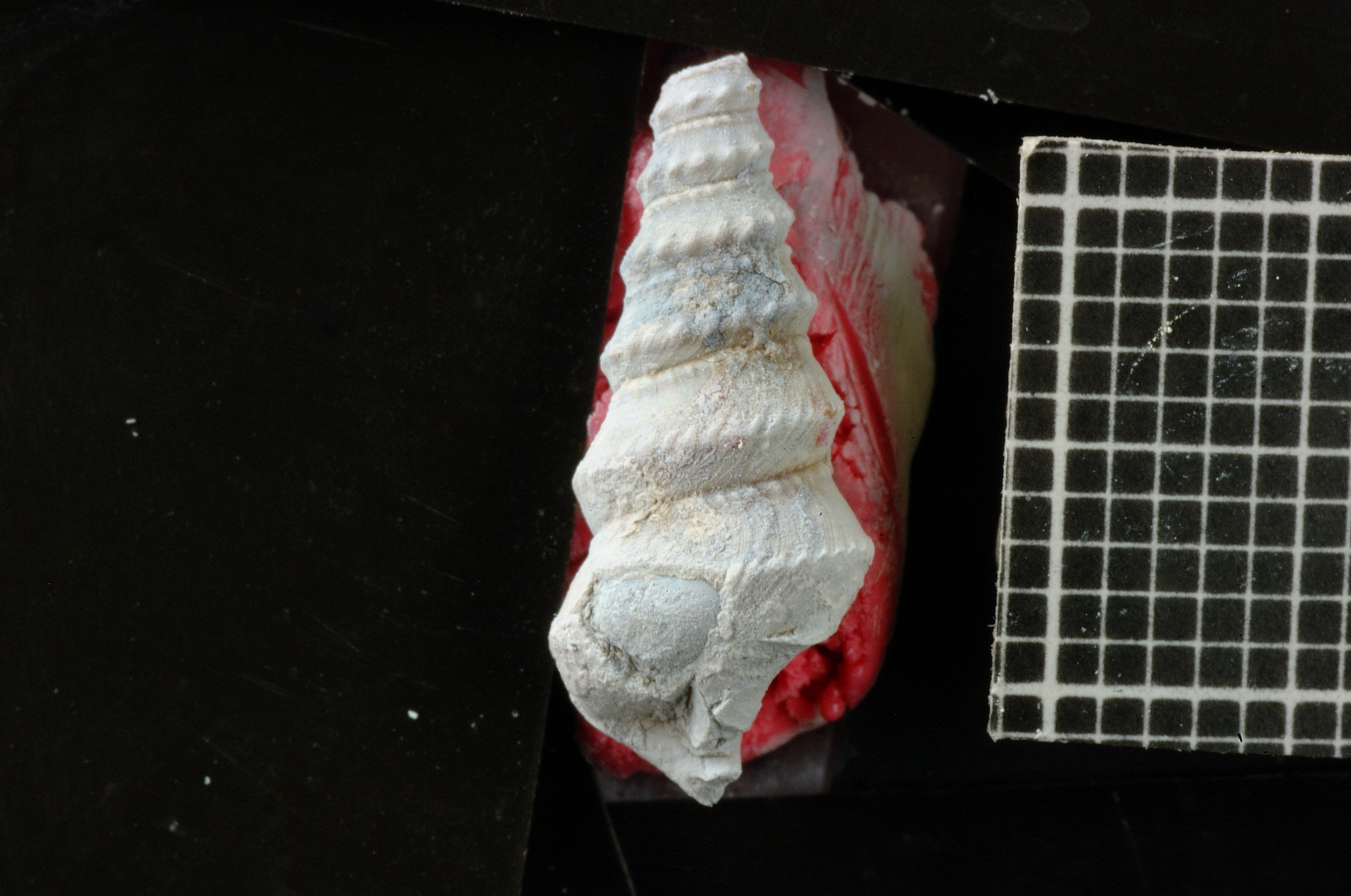 Especie de la clase Mollusca, perteneciente al Cretácico de la formación Agrio, Agua de la Mula.